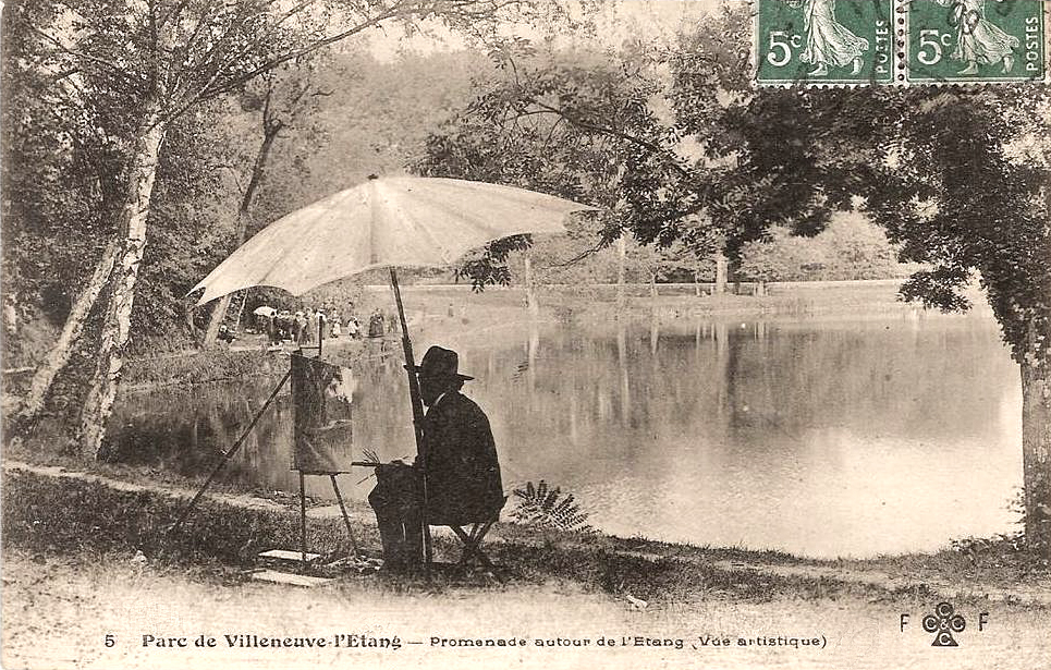 The artist at Villeneuve l'Etang circa 1909